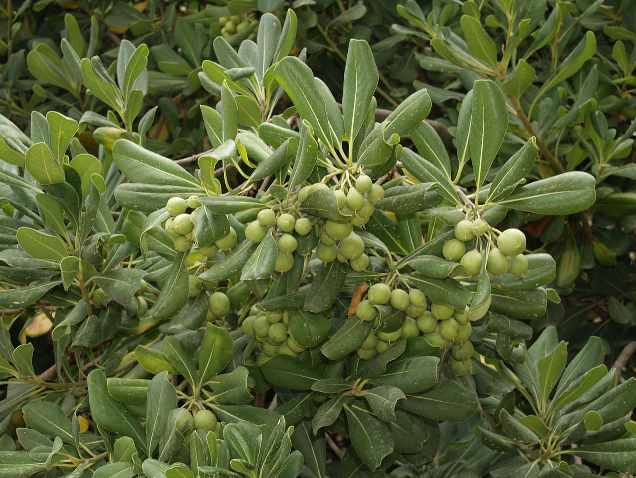 Pittosporum tobira, frutos tempranos. Parque del Oeste, Madrid.